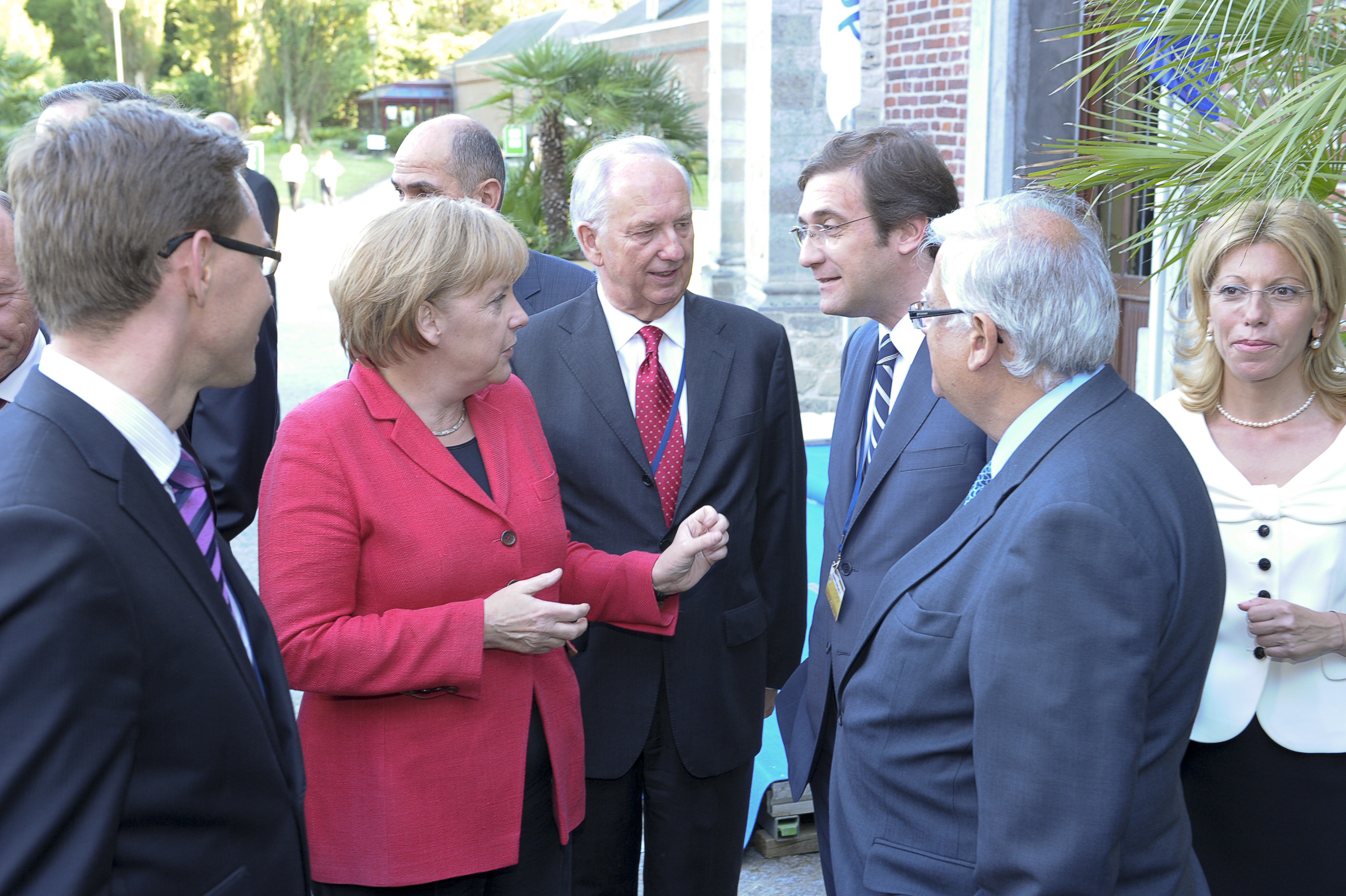 EPP Summit June 2010